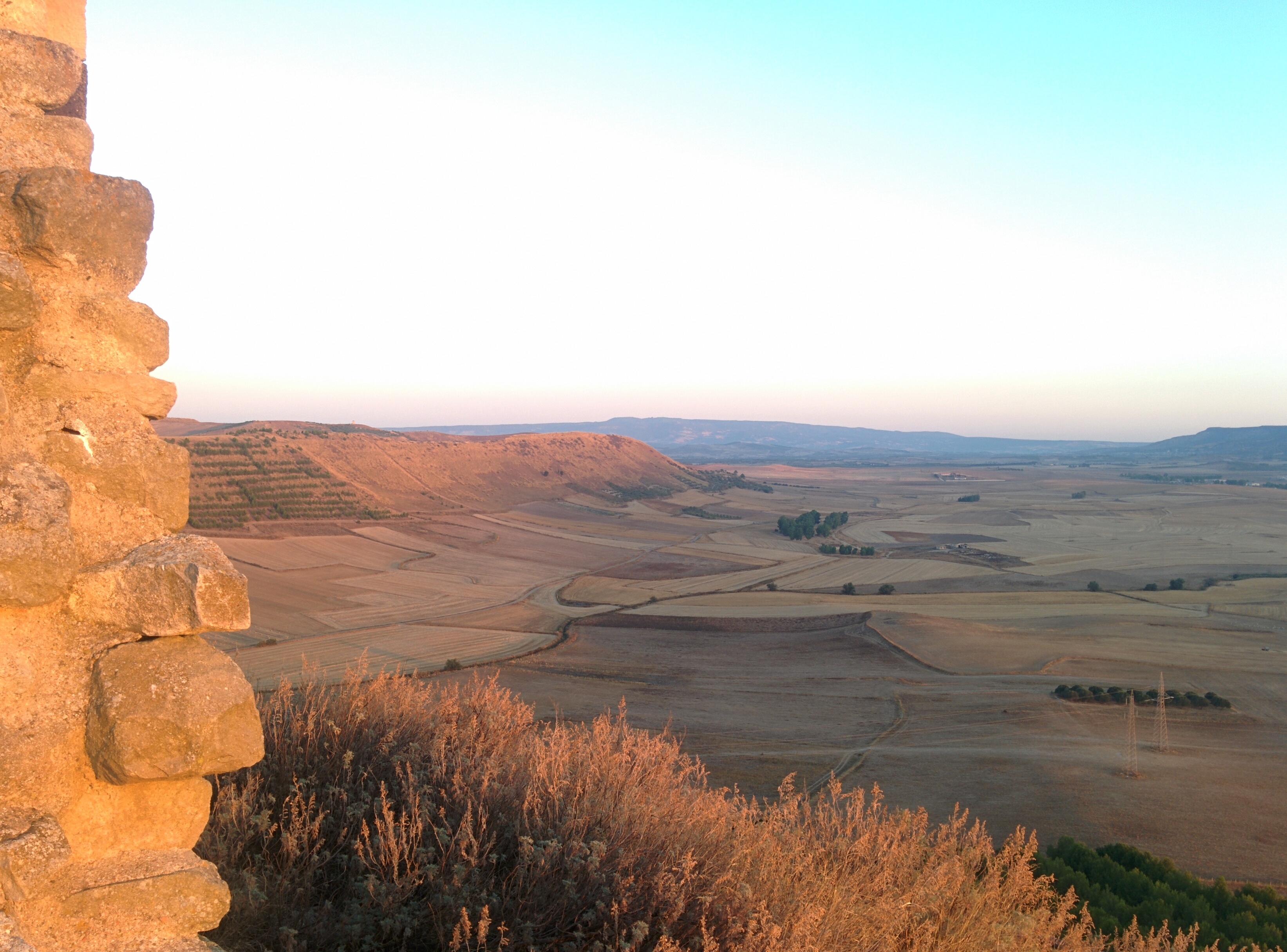 vista panoramica dal castello di Las Plassas